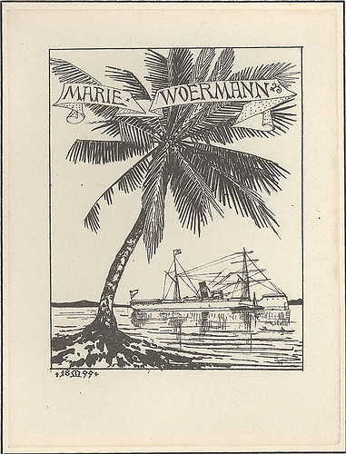 Zeichnung von Marie Woermann mit dem nach ihr getauften Schiff